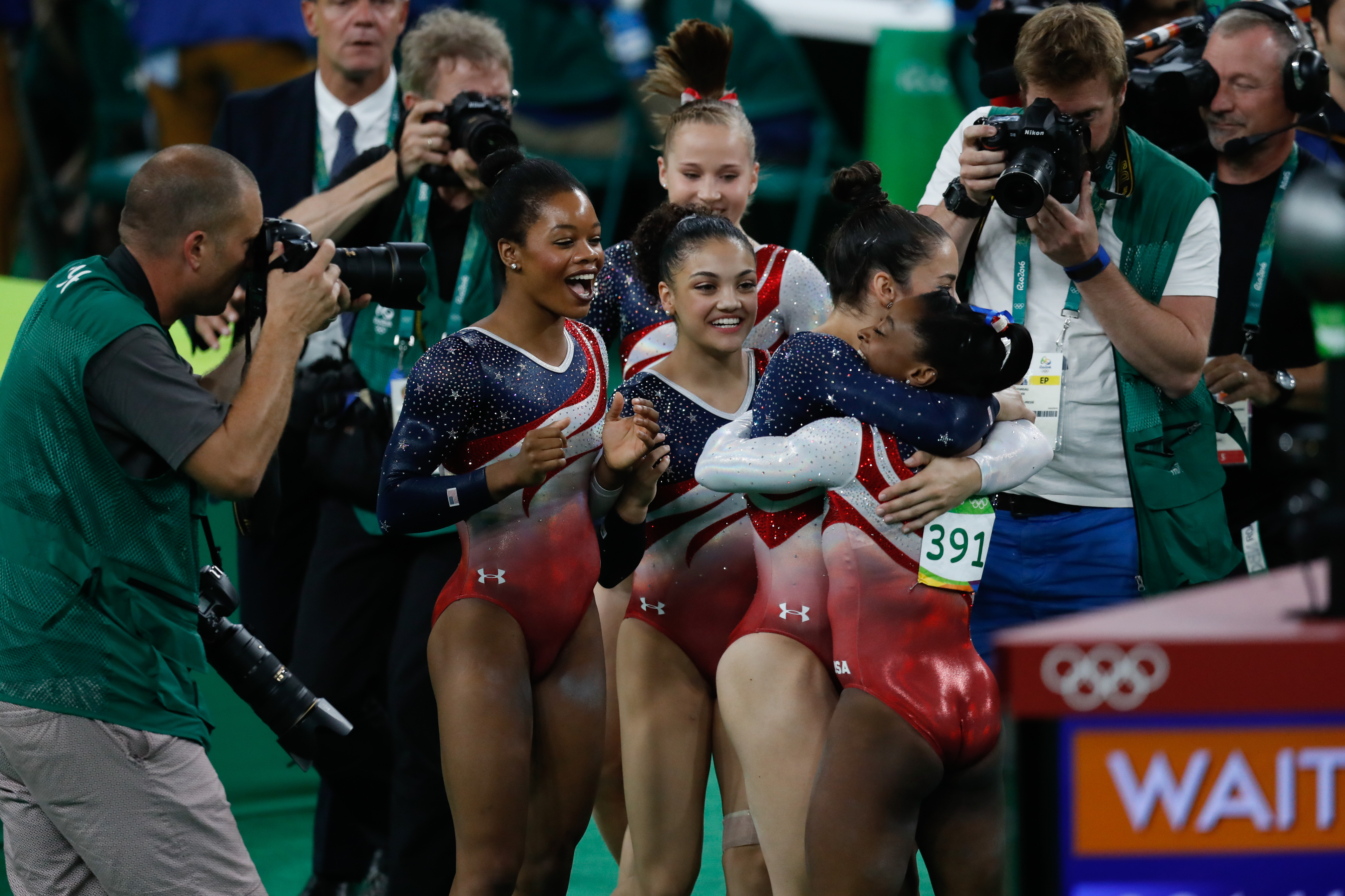 Rio de Janeiro - Ginastas dos Estados Unidos comemoram medalha de ouro na disputa por equipes feminina nos Jogos Olímpicos Rio 2016. (Fernando Frazão/Agência Brasil)